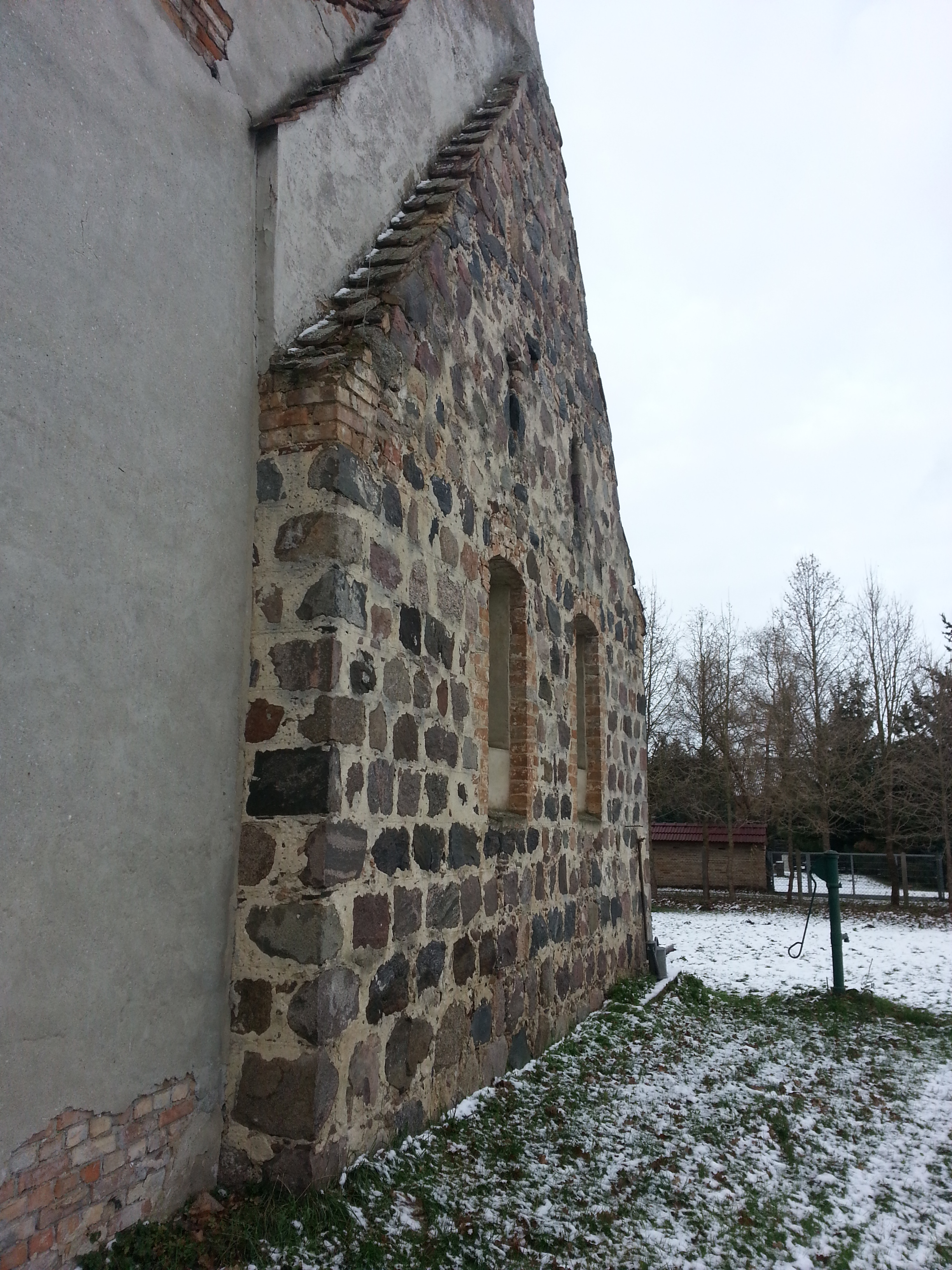 ostseite der dorfkirchemarzahne